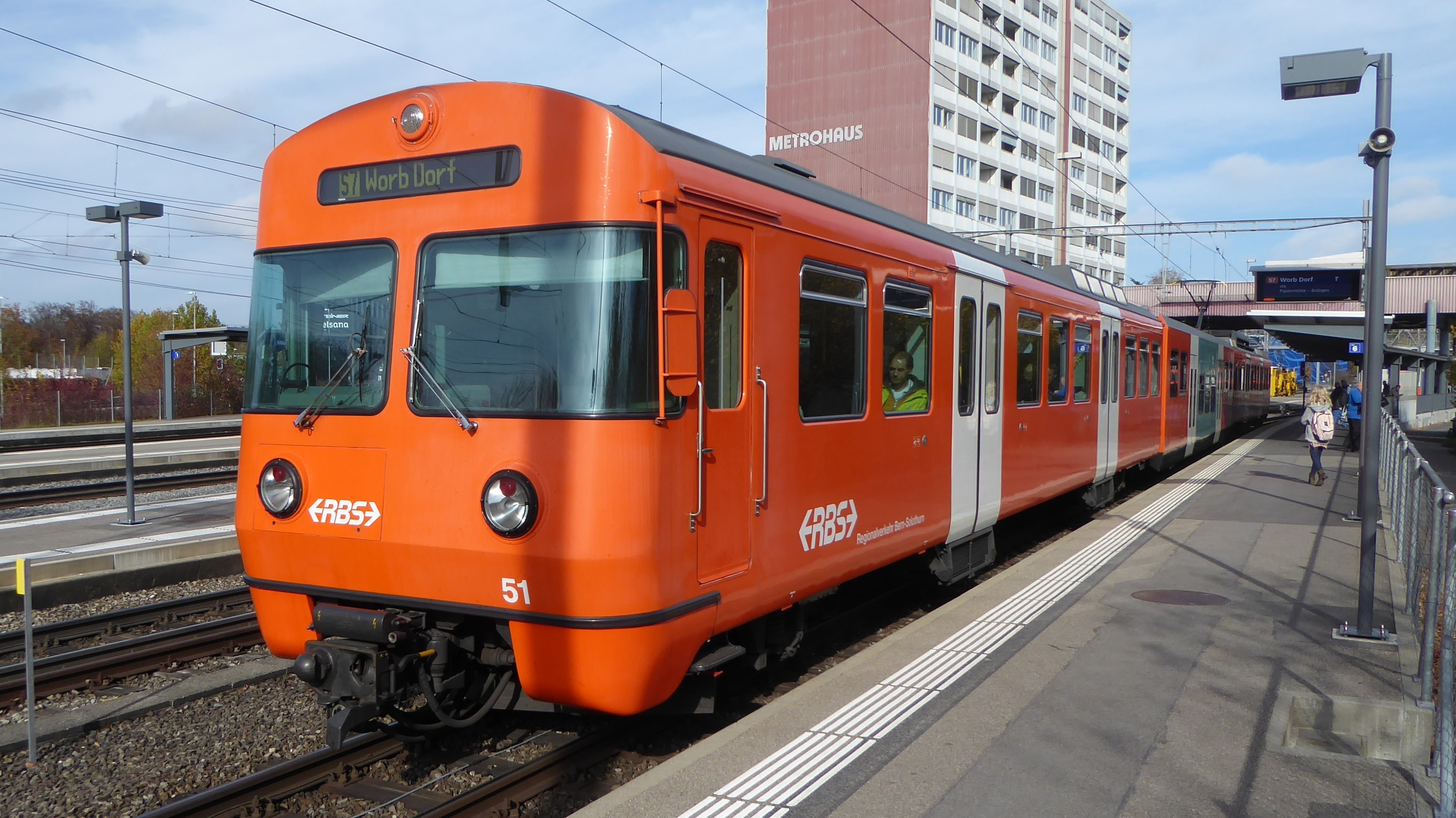 Be 4/12 51 des Regionalverkehrs Bern-Solothurn in Worblaufen